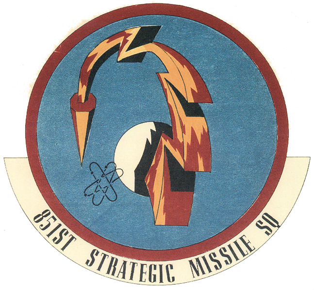 851st Strategic Missile Squadron emblem